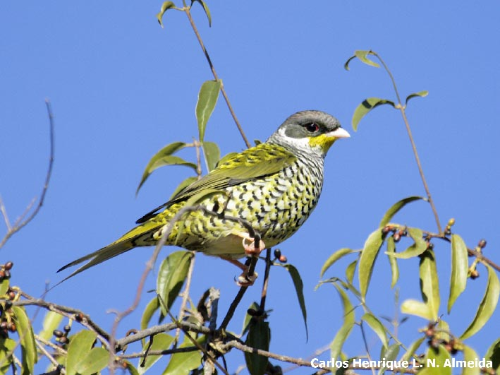 Phibalura flavirostris